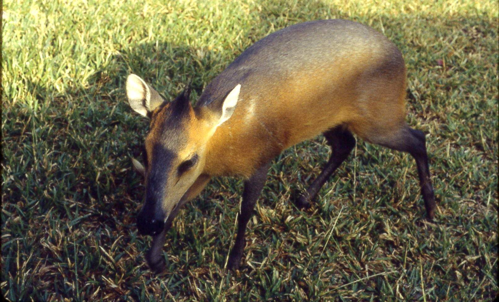 Céphalophe Rufilatus